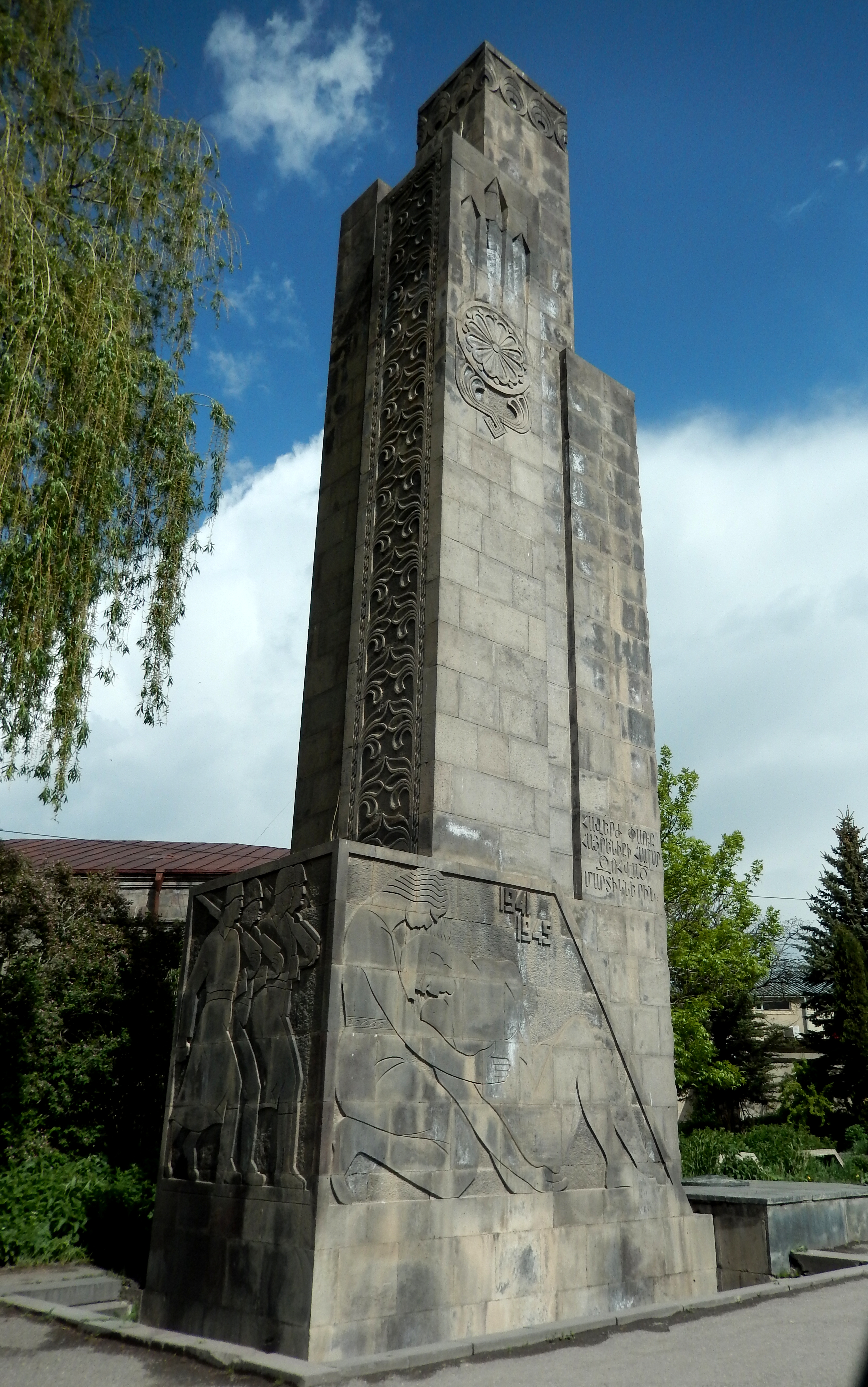 Հուշարձան Երկրորդ աշխարհամարտում զոհվածներին, Գավառ 1/36